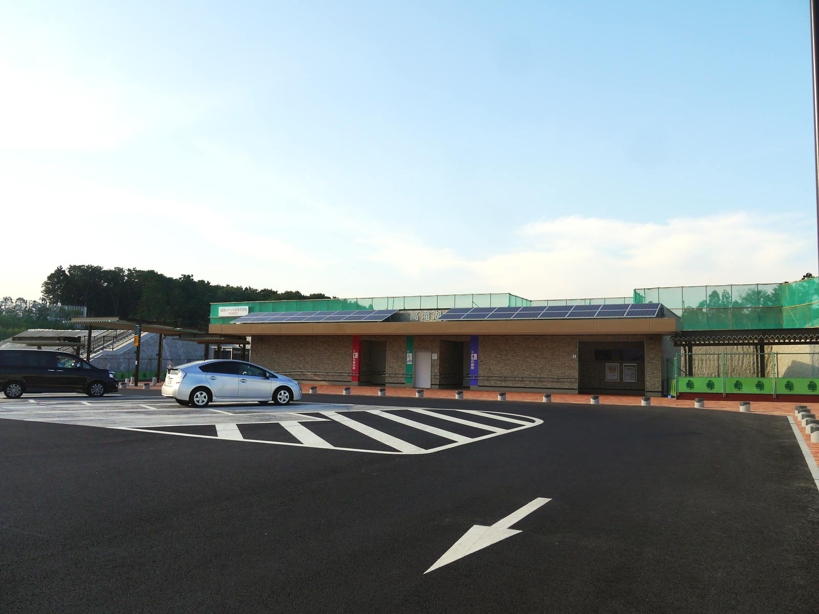 高滝湖PA概観